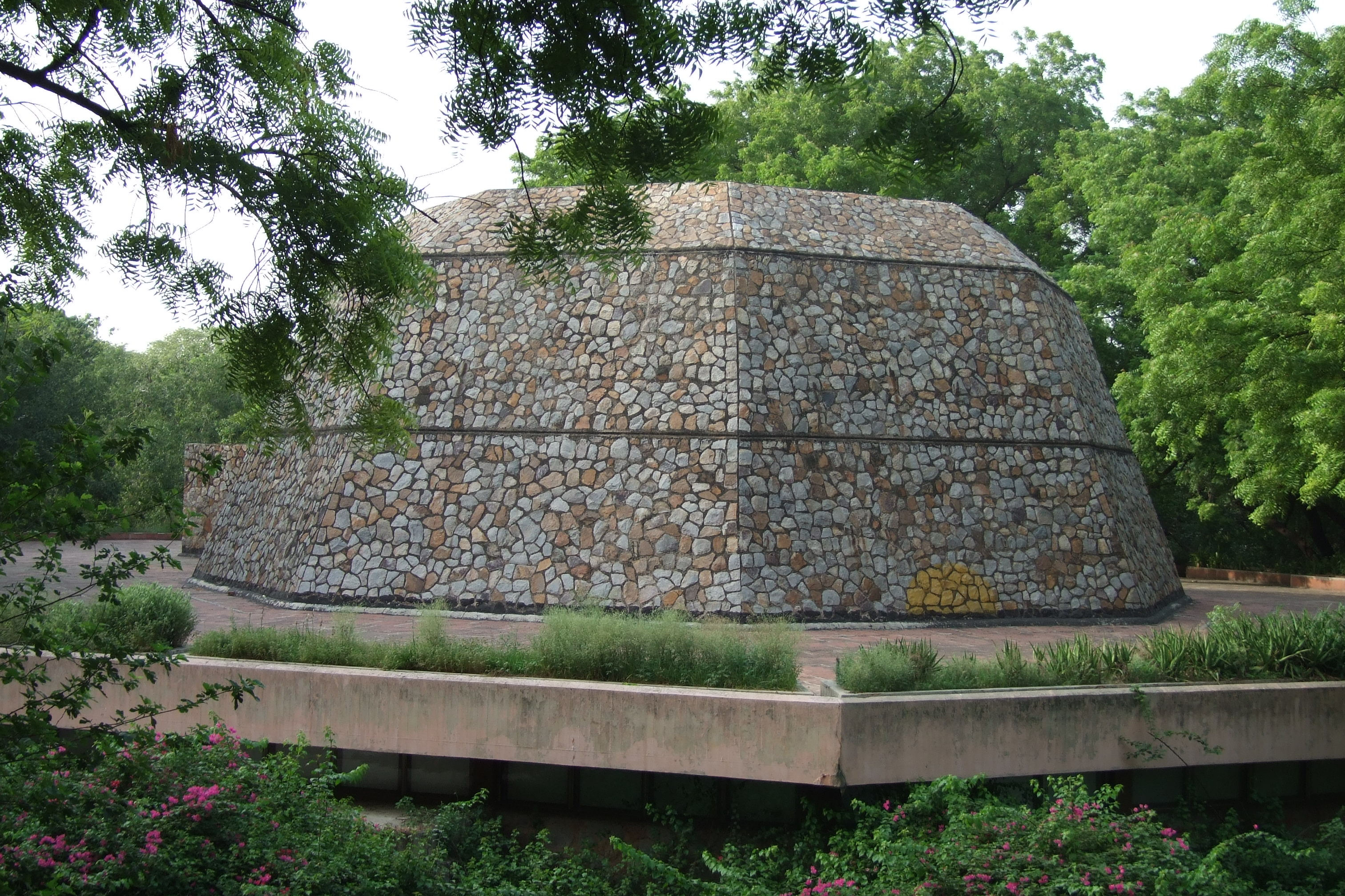 Nehru Planetarium, New Delhi, India.